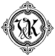 Logo des Verlages von Velhagen und Klasing um 1903